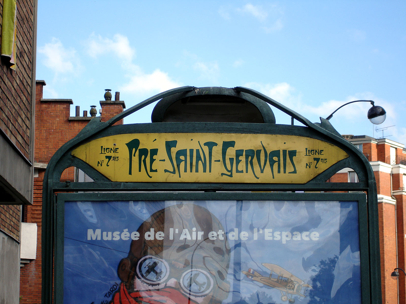 Station Pré-Saint-Gervais de la ligne 7 bis du métro de Paris, France.